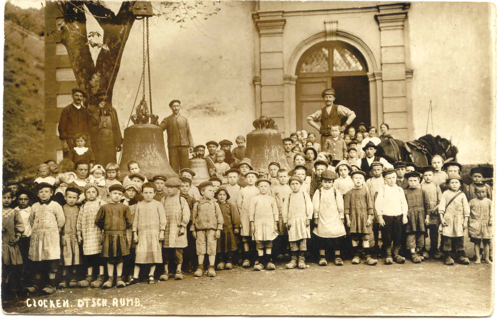 Départ des cloches de l'église Sainte Rosalie pour être fondues par l'armée allemande le 8 mai 1917